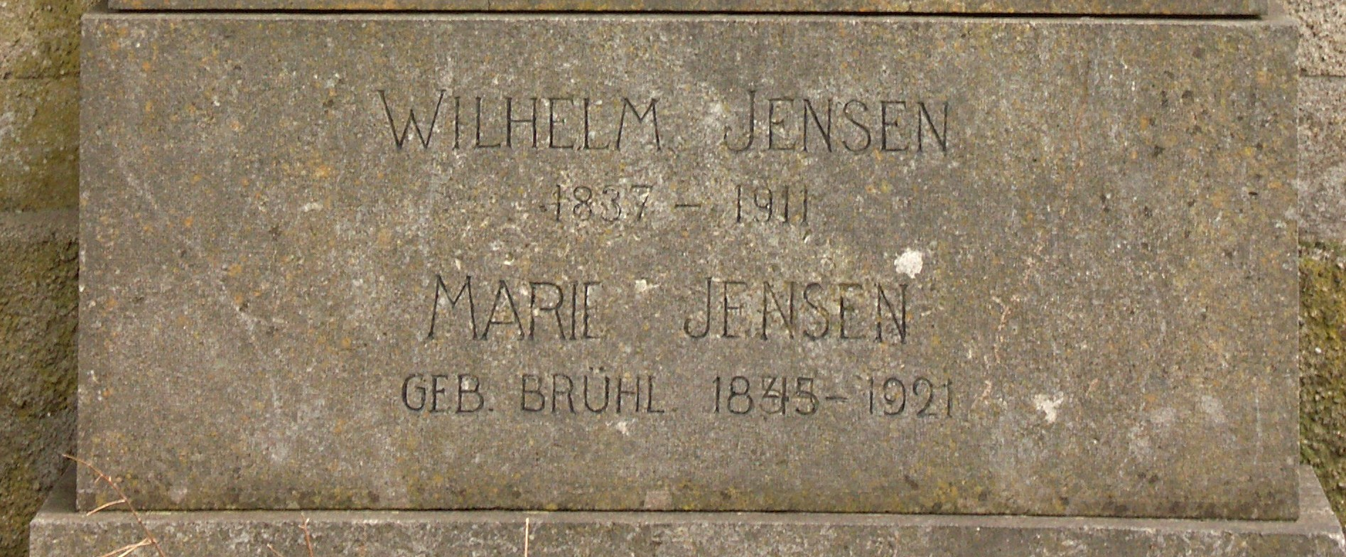 Grabmal von Wilhelm Jensen und seiner Gattin Marie, geschaffen von Bernhard Bleeker, München (ca. 1912)